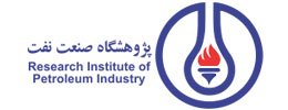 لوگو پژوهشگاه